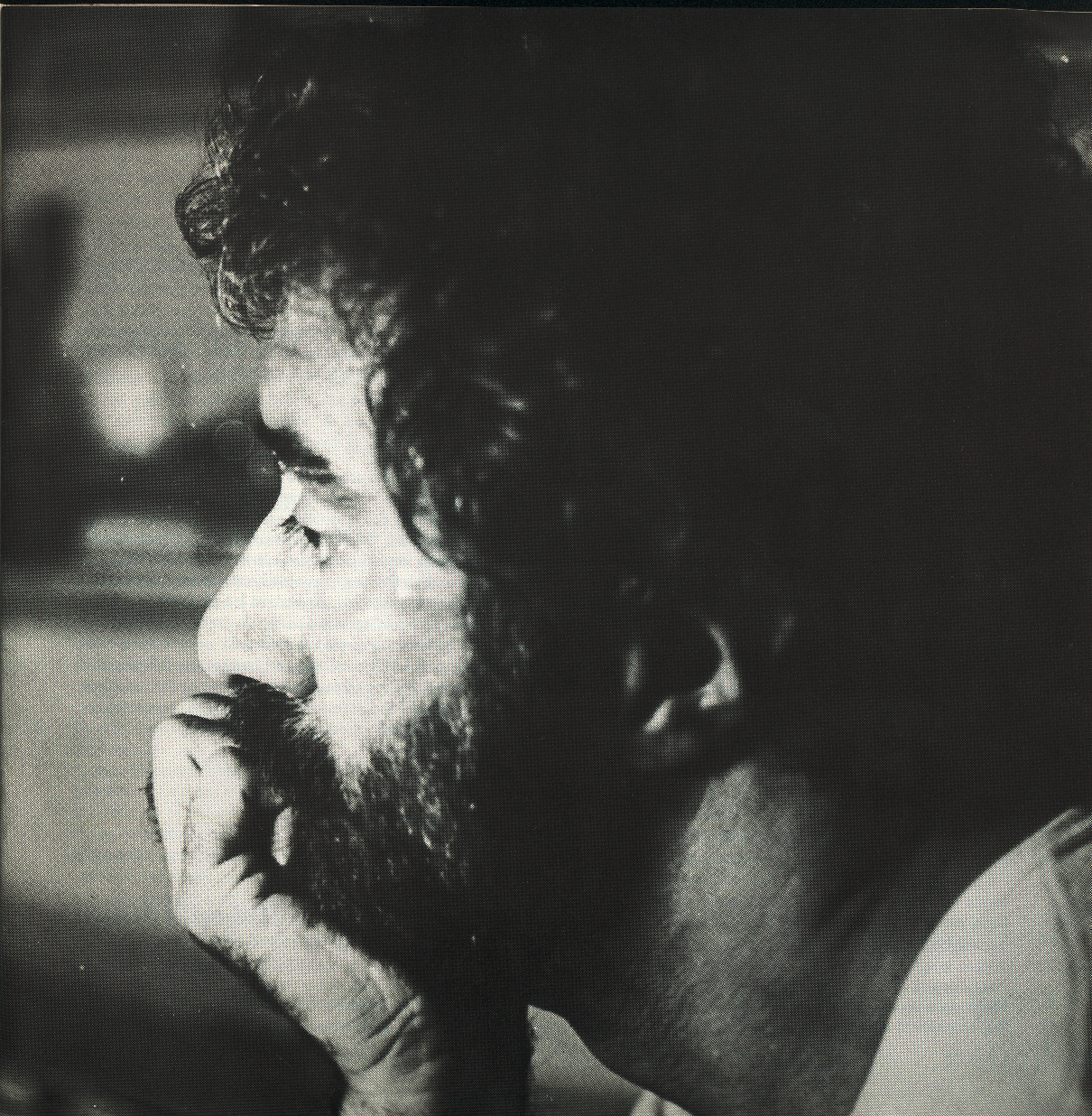 FOTO DEL ARTISTA